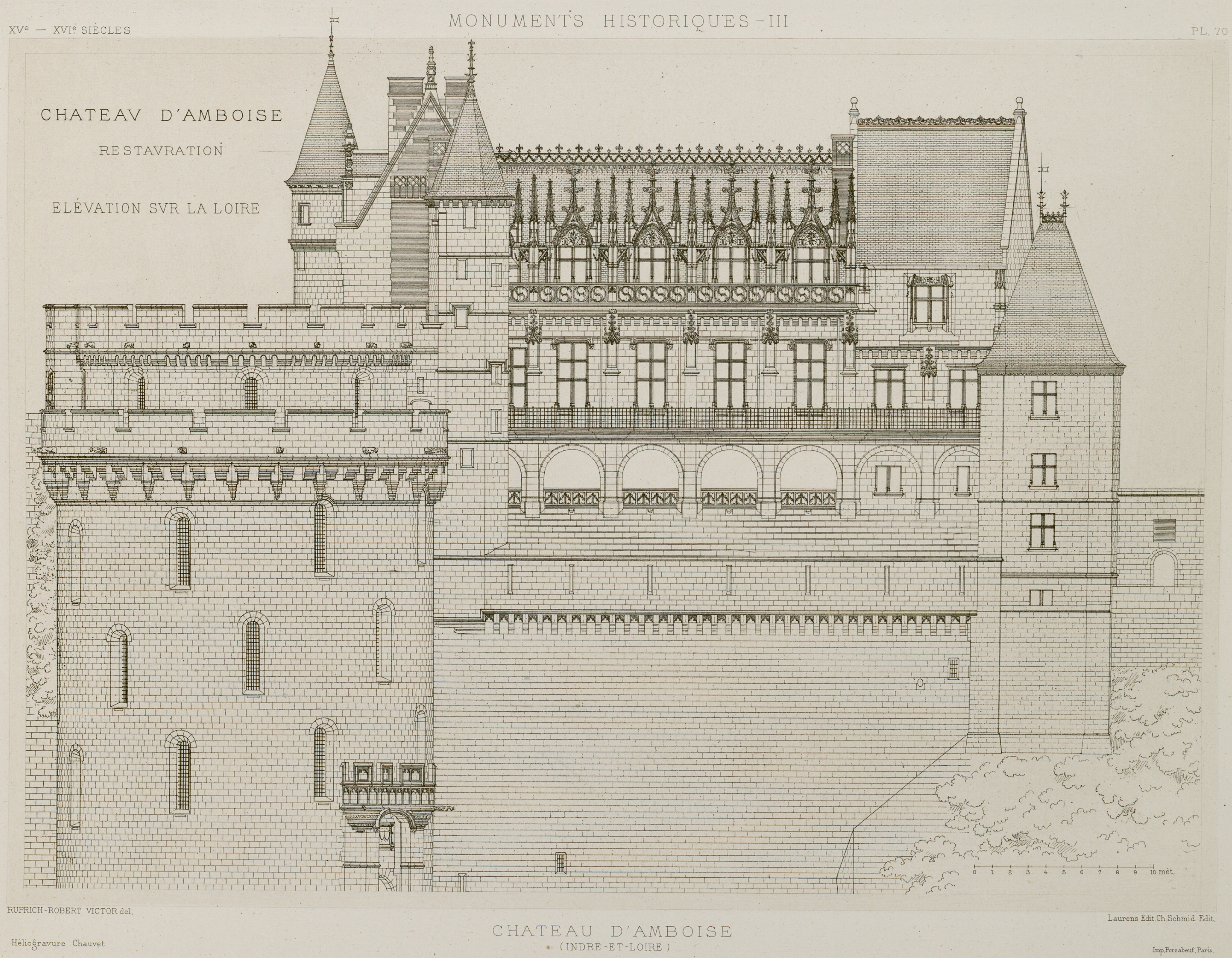 Schloss Amboise, loireseitige Fassade nach der Restaurierung unter den Architeken Ruprich-Robert